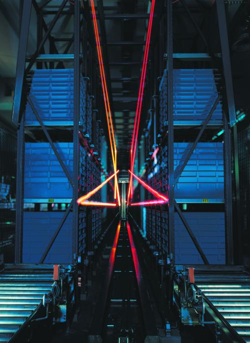 Hochregallager dräxlmaier Group